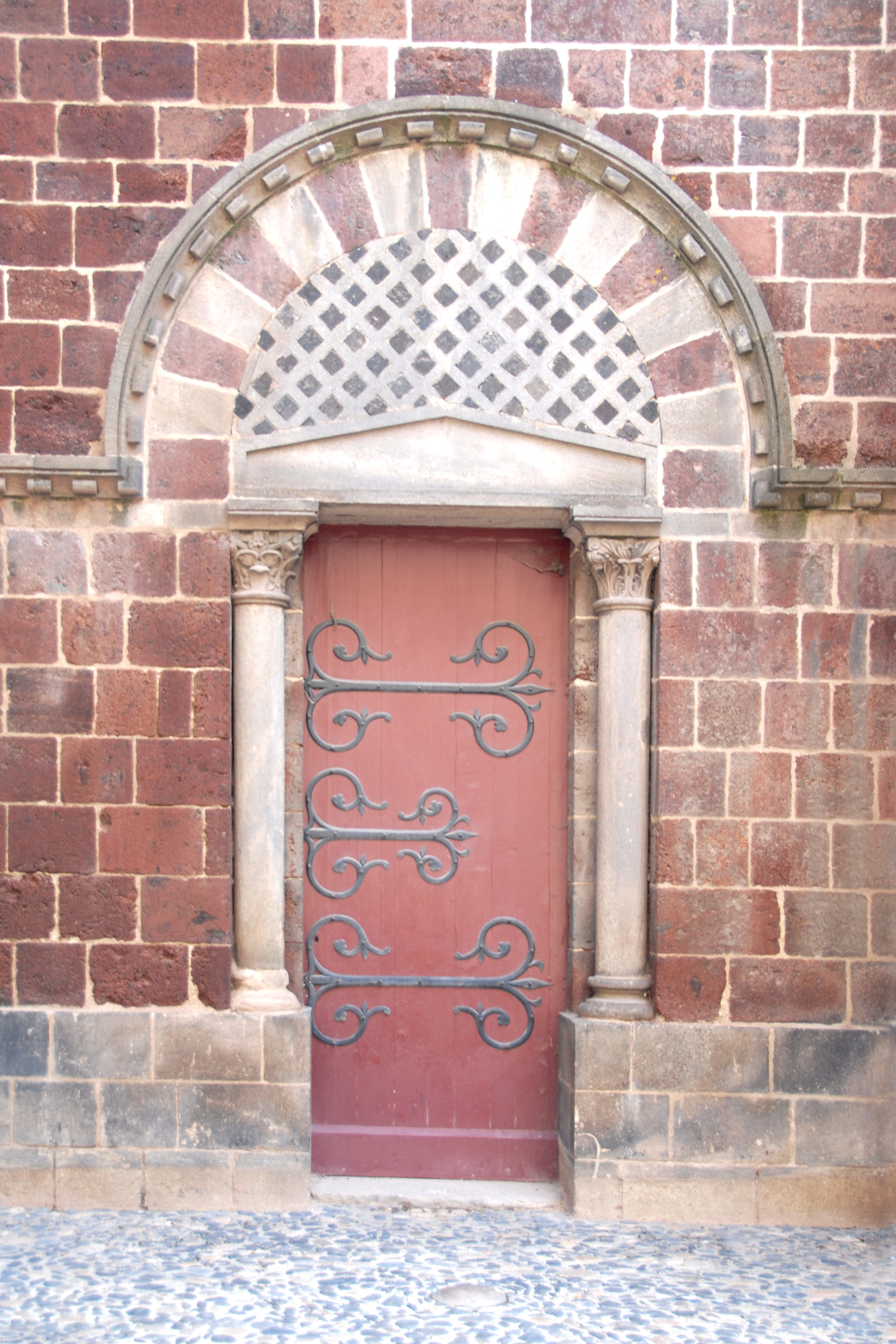 St.-Julien Brioude, seitl. Fassadenportal